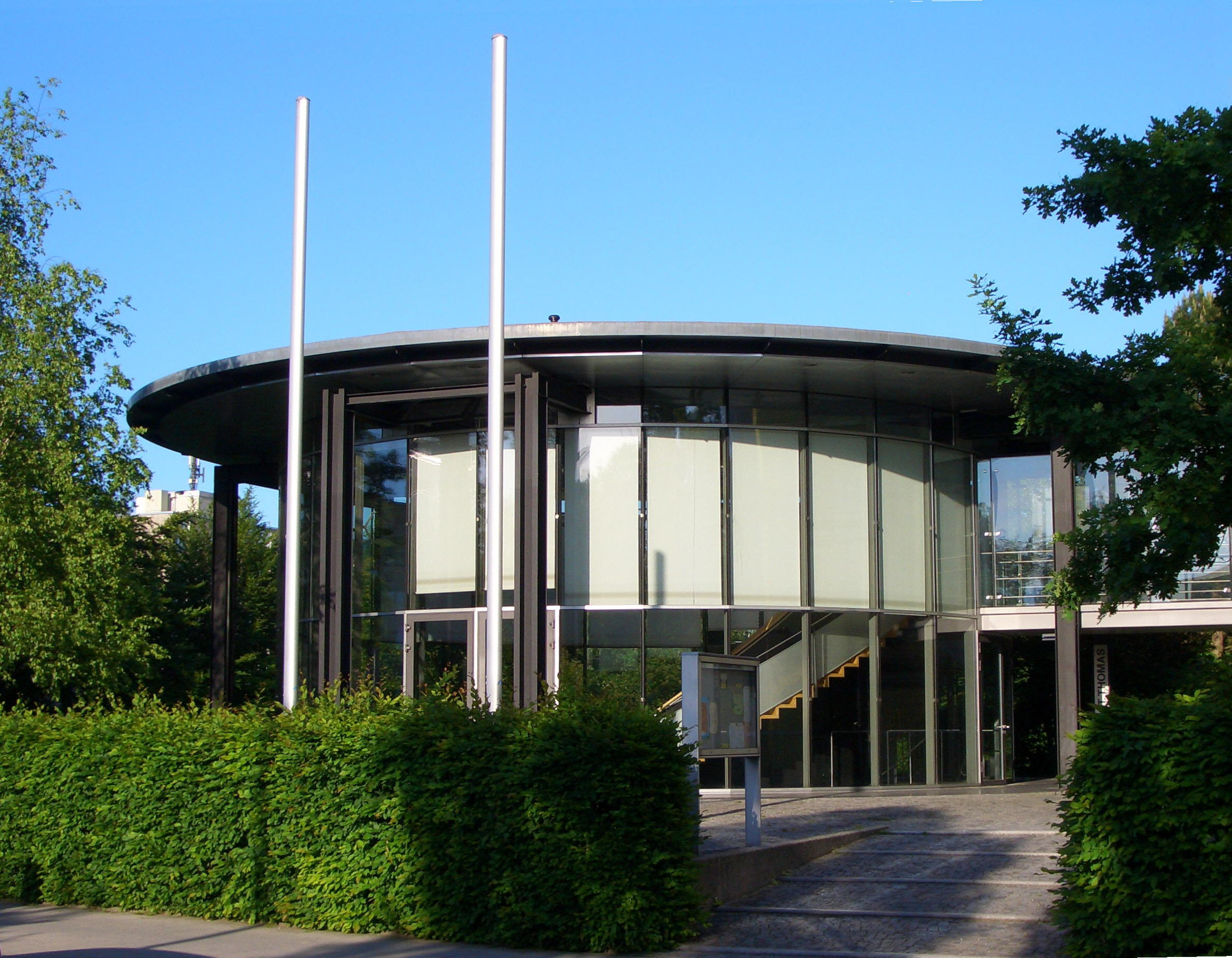 St. Thomas, München-Johanneskirchen, Nordtrakt